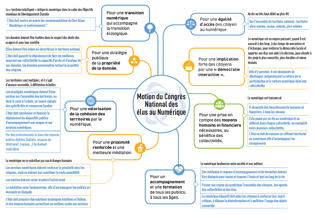 Cette motion présente la vision des élus du réseau » Villes Internet » sur les politiques publiques numériques locales, et leurs objectifs. Dans cette perspective, elle s’intéresse au rôle de l’Etat et aux compétences des collectivités locales, compétences réglementaires et savoir faire.